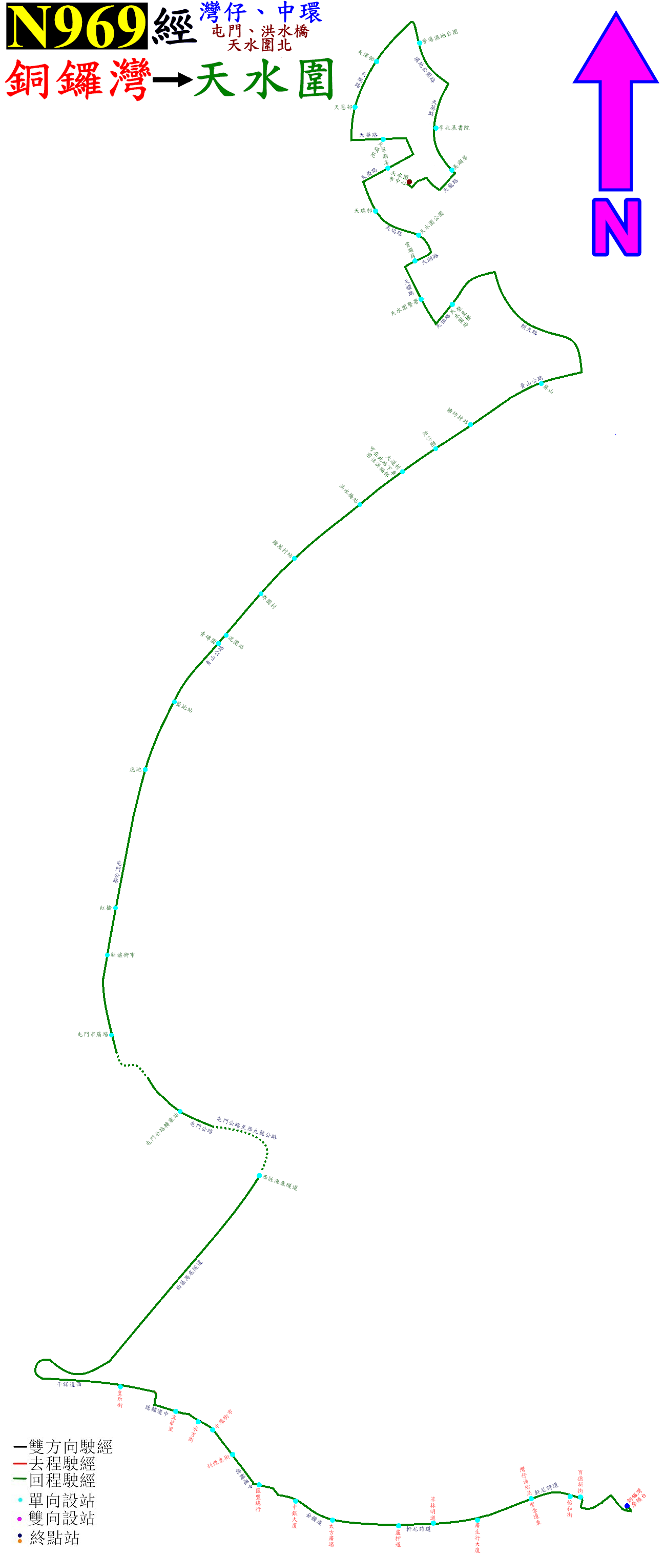 中文（香港）: 深宵過海隧巴N969回程方向的走線圖